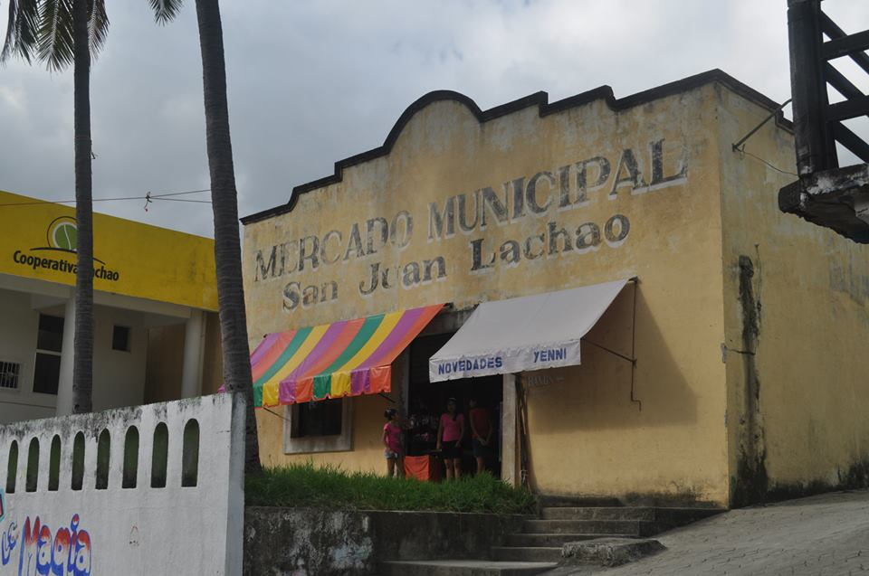 San Juan Lachao, Oaxaca.